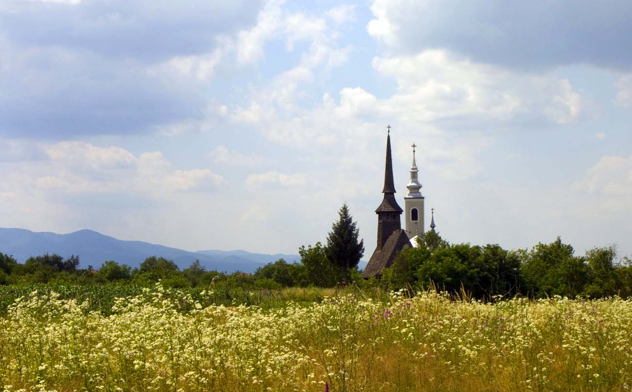 Stânceşti, Bihor, biserica de lemn şi cea nouă de zid, perspectivă din câmp.